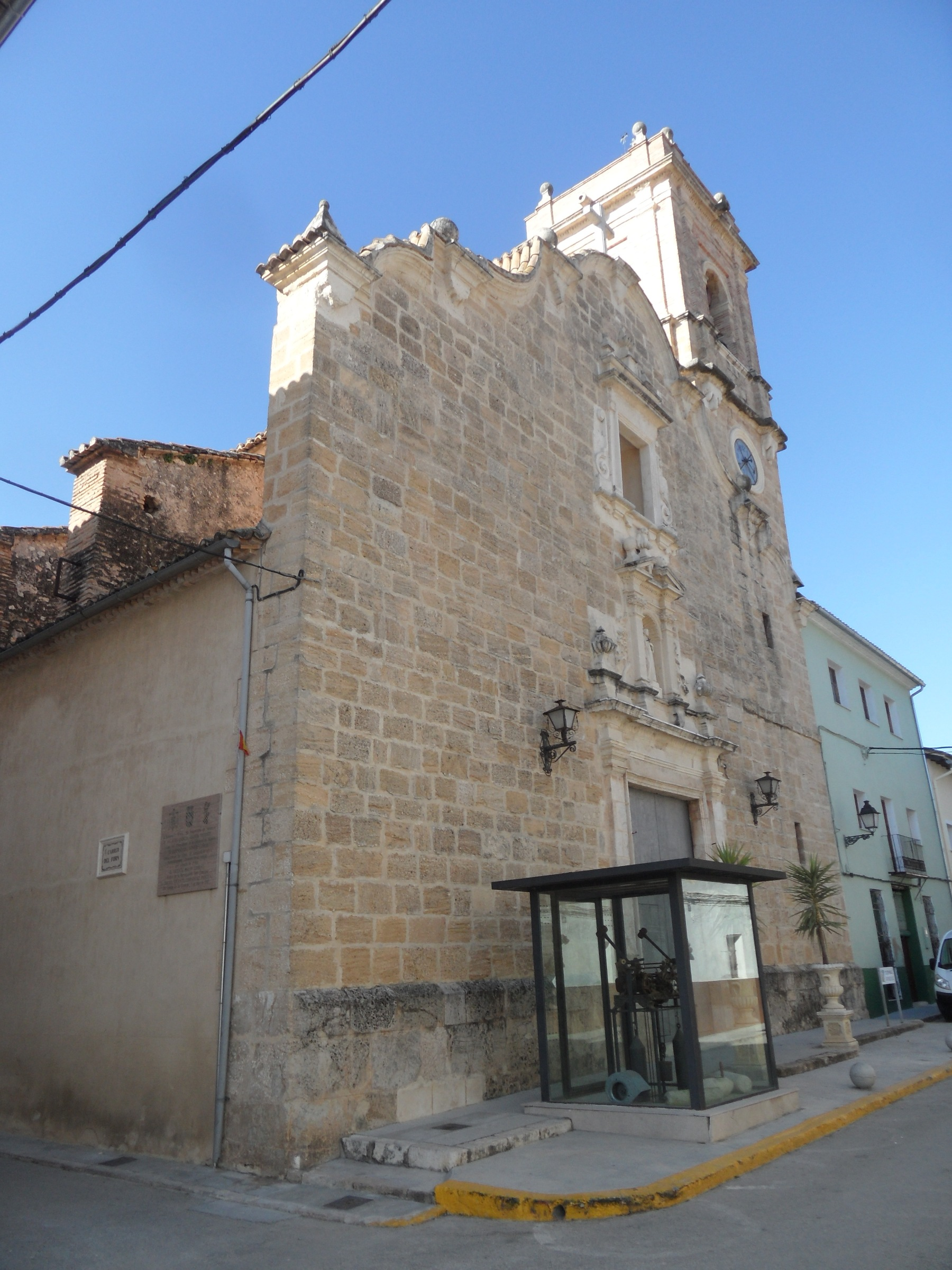 Església de la Granja de la Costera.